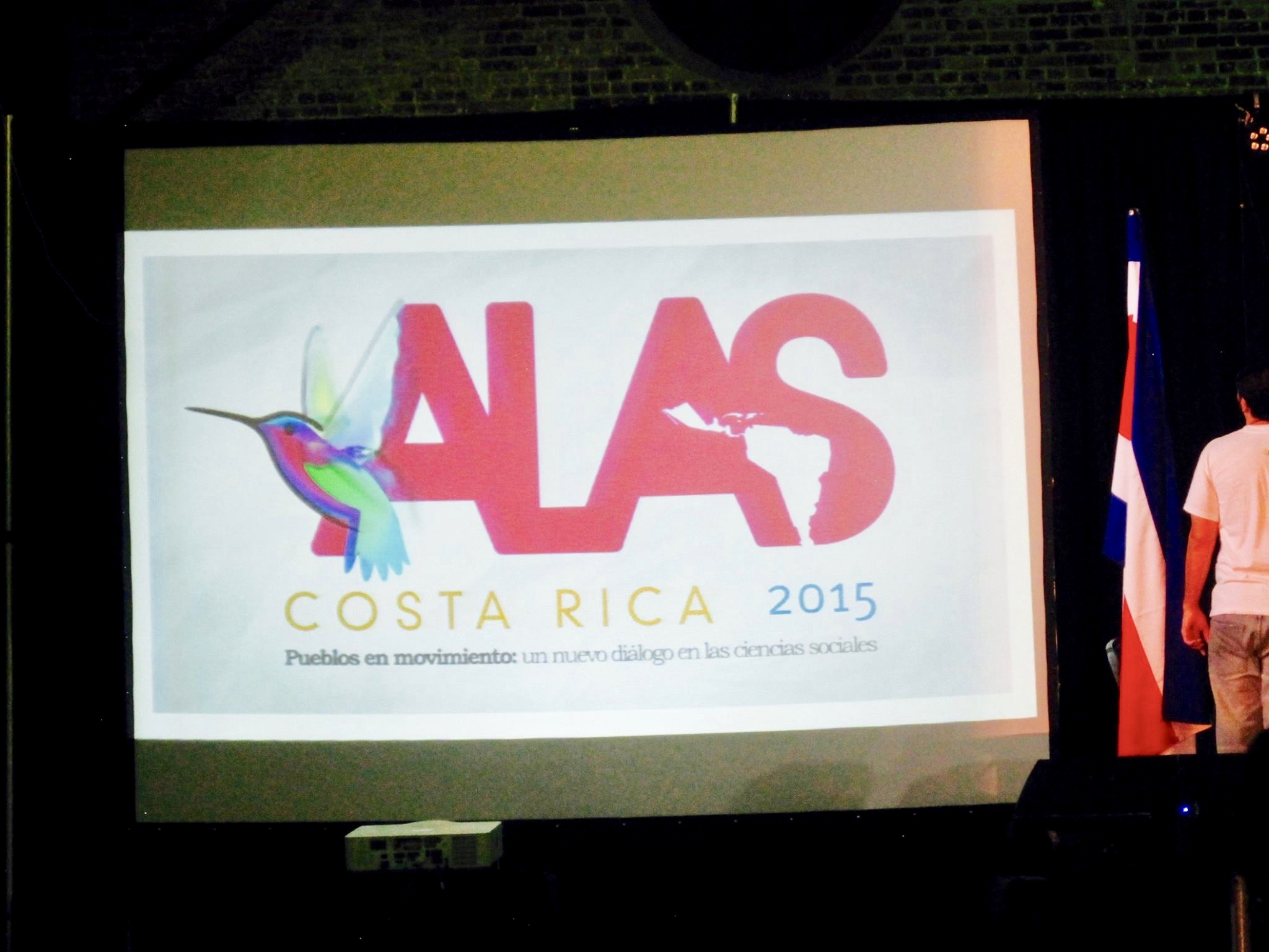 Proyección en el Congreso ALAS 2015, San José, Costa Rica